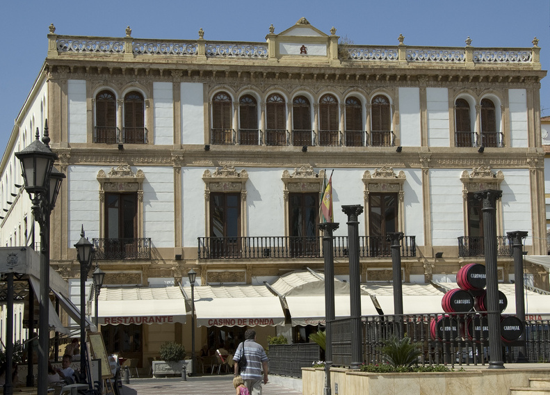 Casino de Ronda, Málaga, Spain.